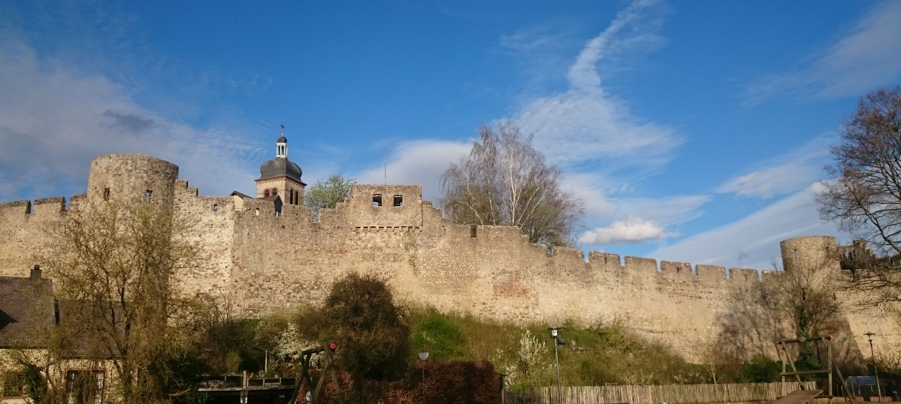 Hillesheim